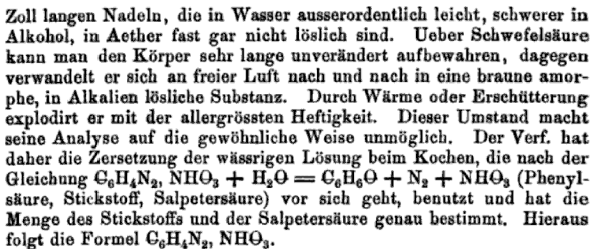 Griess-scan